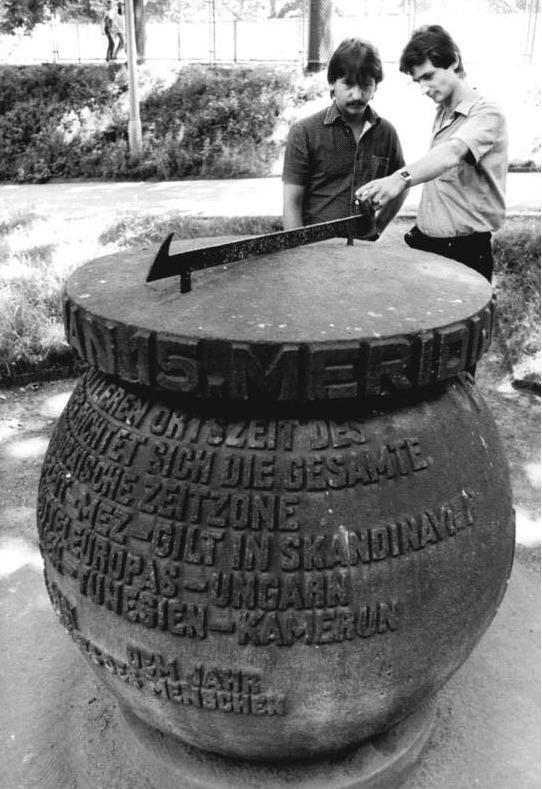 Görlitz, Gedenkstein ADN-ZB Hiekel 1.7.1983 Bez. Dresden: Görlitz- Unmittelbar am Grenzübergang in die VRP steht der Gedenkstein, der den Verlauf des 15. Meridians symbolisiert. Er wiurde 1961 anläßlich des ersten Weltraumfluges eines Menschen errichtet. Die Inschrift lautet: Nach der mittleren Ortszeit des 15. Längenkreises richtet sich die gesamte mitteleuropäische Zeitzone. Die MEZ gilt in Skandinavien-den Staaten Mitteleuropas-Ungarn-Jugoslawien-Italien-Tunesien-Kamerun. - siehe auch 1983-0701-010 und 1983-0701-011